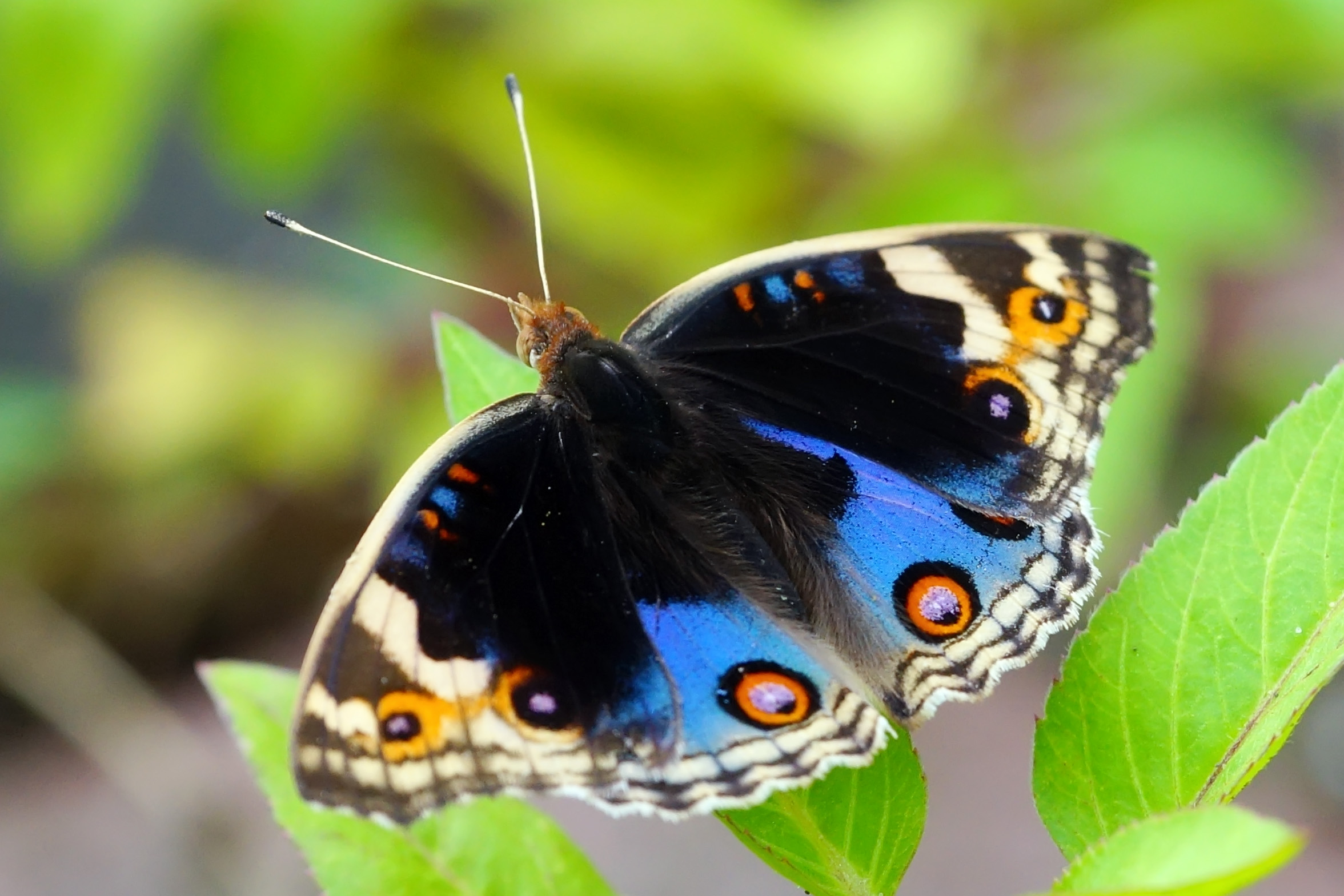 青眼蛺蝶 Junonia orithya